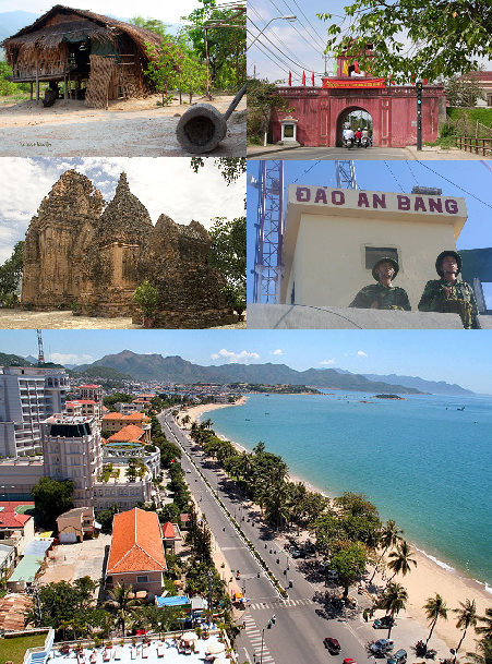 Một số địa danh của tỉnh Khánh Hòa, Việt Nam; ghép từ các hình sau: File:Dien Khanh eastern gate.JPG, File:Nhatrang rue tran phu.jpg, File:Champa Po Nagar Nha Trang.jpg, File:Raglai house.jpg, File:Đảo An bang..JPG